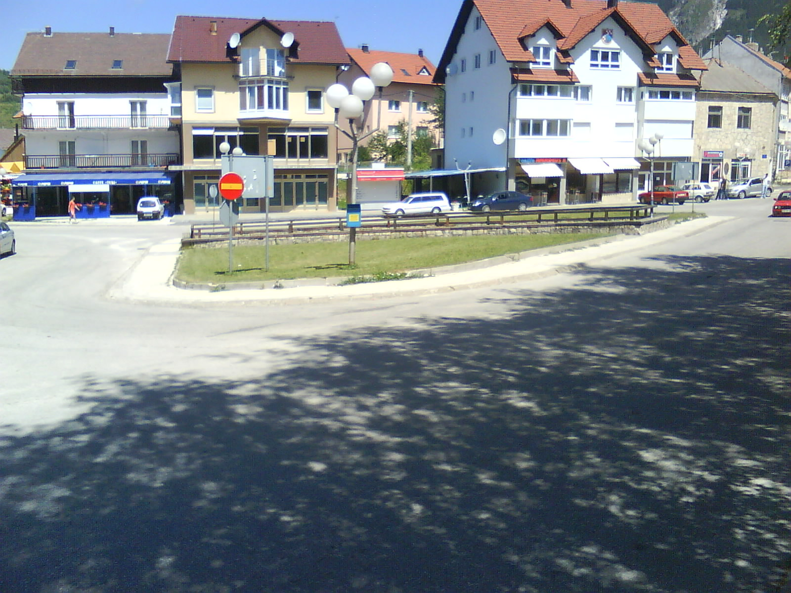 Kupres